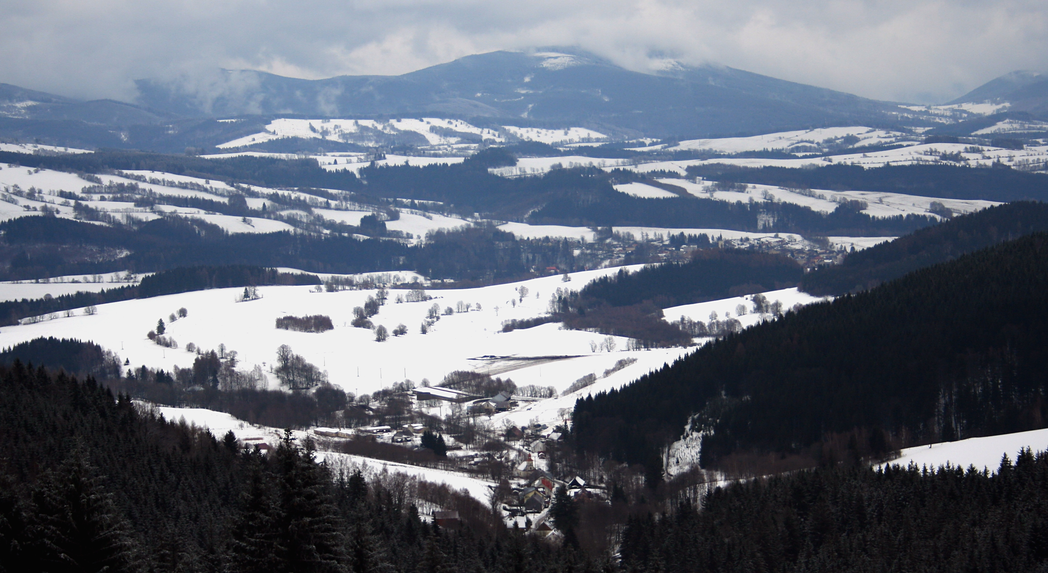 Staré Město pod Sněžníkem